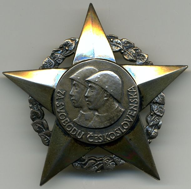 Чехословацкий военный орден "За Свободу"